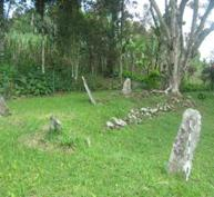 Lokasi pertemuan masyarakat gunung di Tanah Datar, Sumatra Barat yang disebut Medan Bapaneh Gunung.